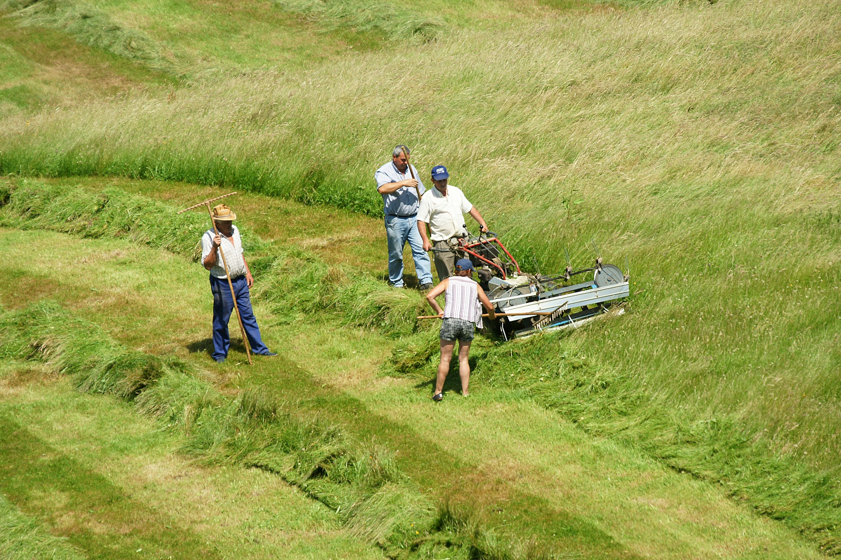 Motosegadora segando un prado de hierba en Limpias (Cantabria, España).